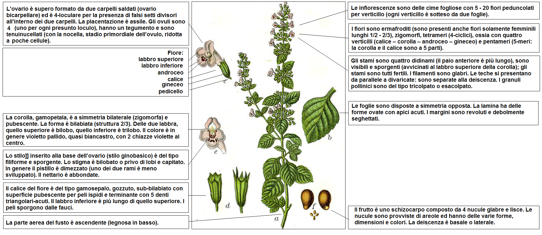 Clinopodium nepeta - Descrizione delle parti della pianta